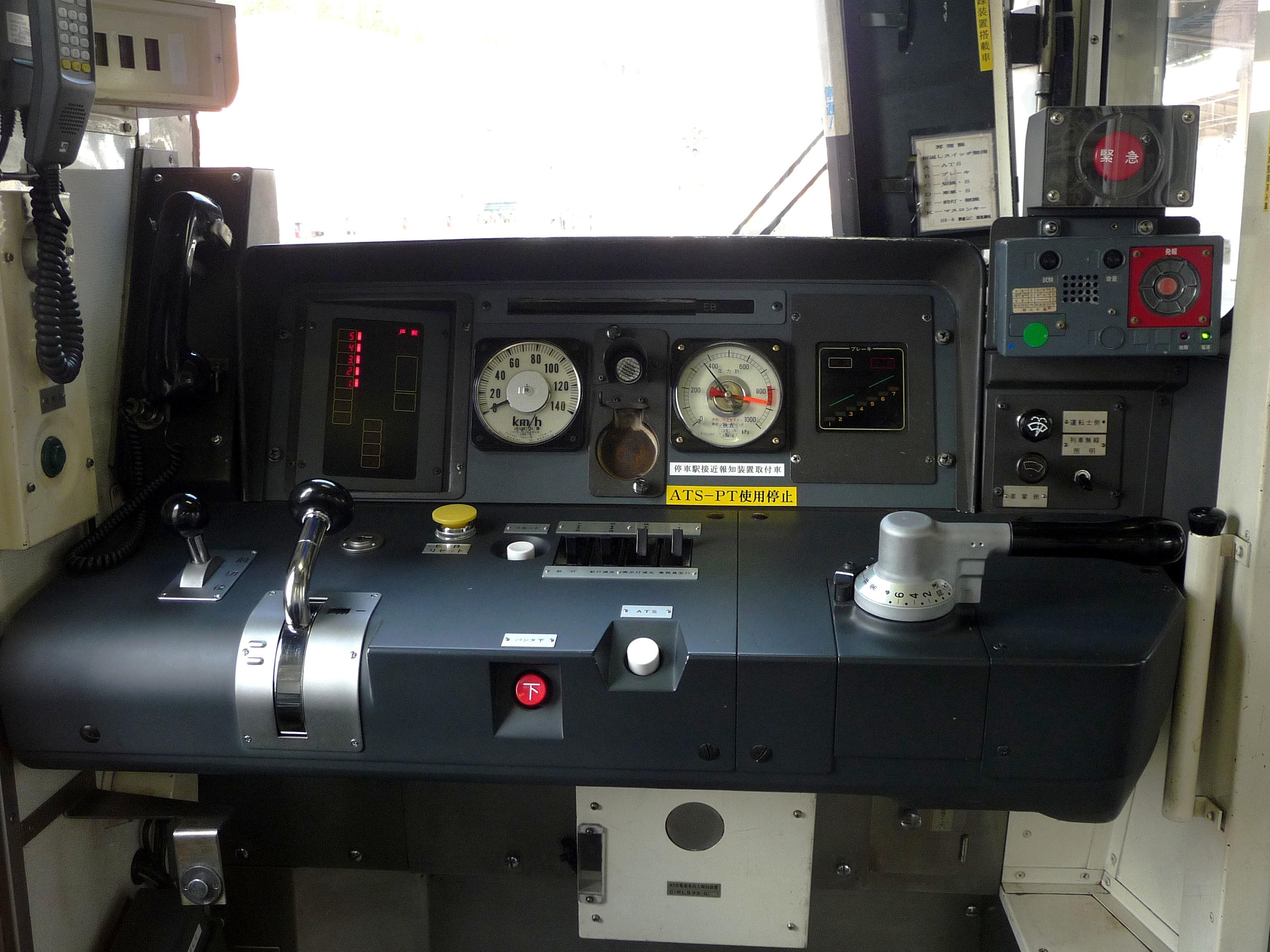 JR東海所属5000番代の運転台。左隅に簡易モニタが設置してある。また、EB装置をリセットする黄色のボタンが追設されている。